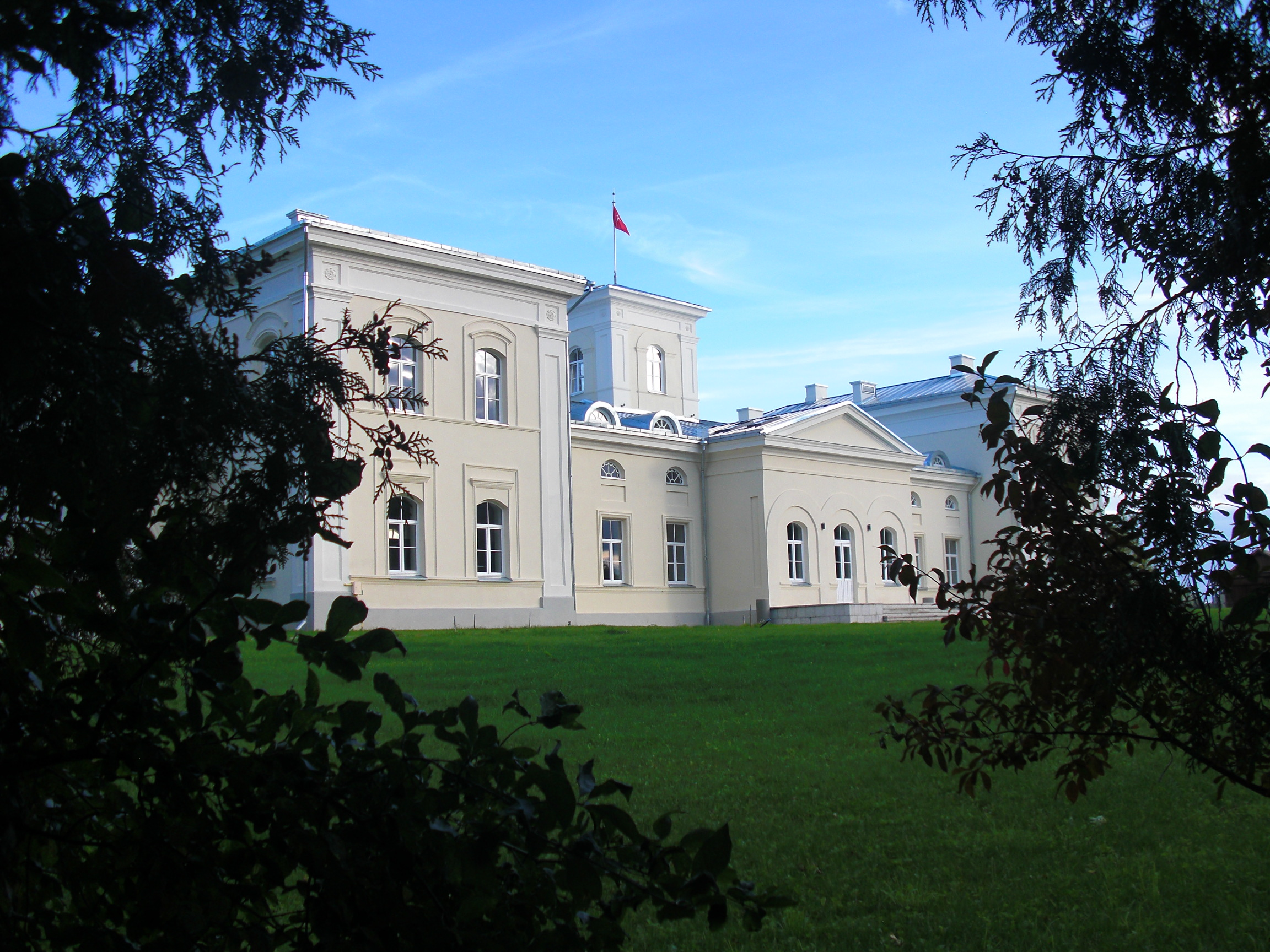 Burbiškio dvaras